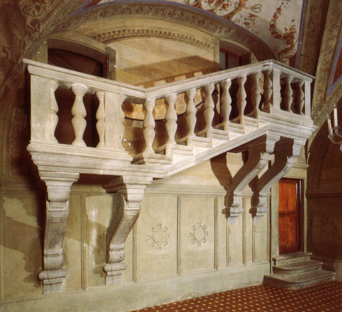 Villa di Poggio a Caiano, scalone di Bianca Cappello, immagine da un libro del 1985